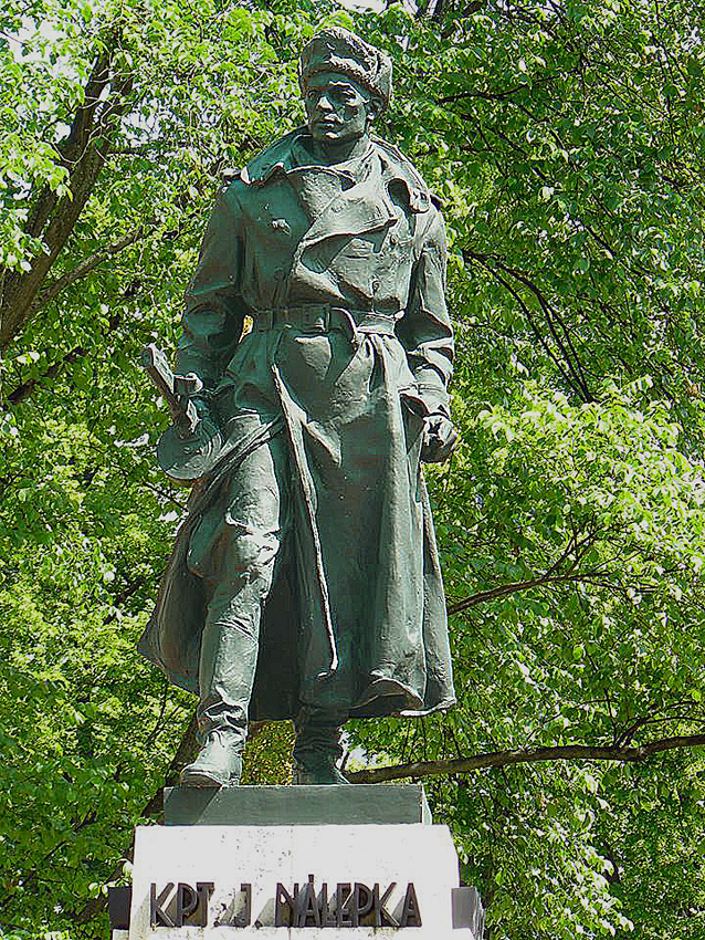 Bronzová plastika kpt. Jána Nálepku